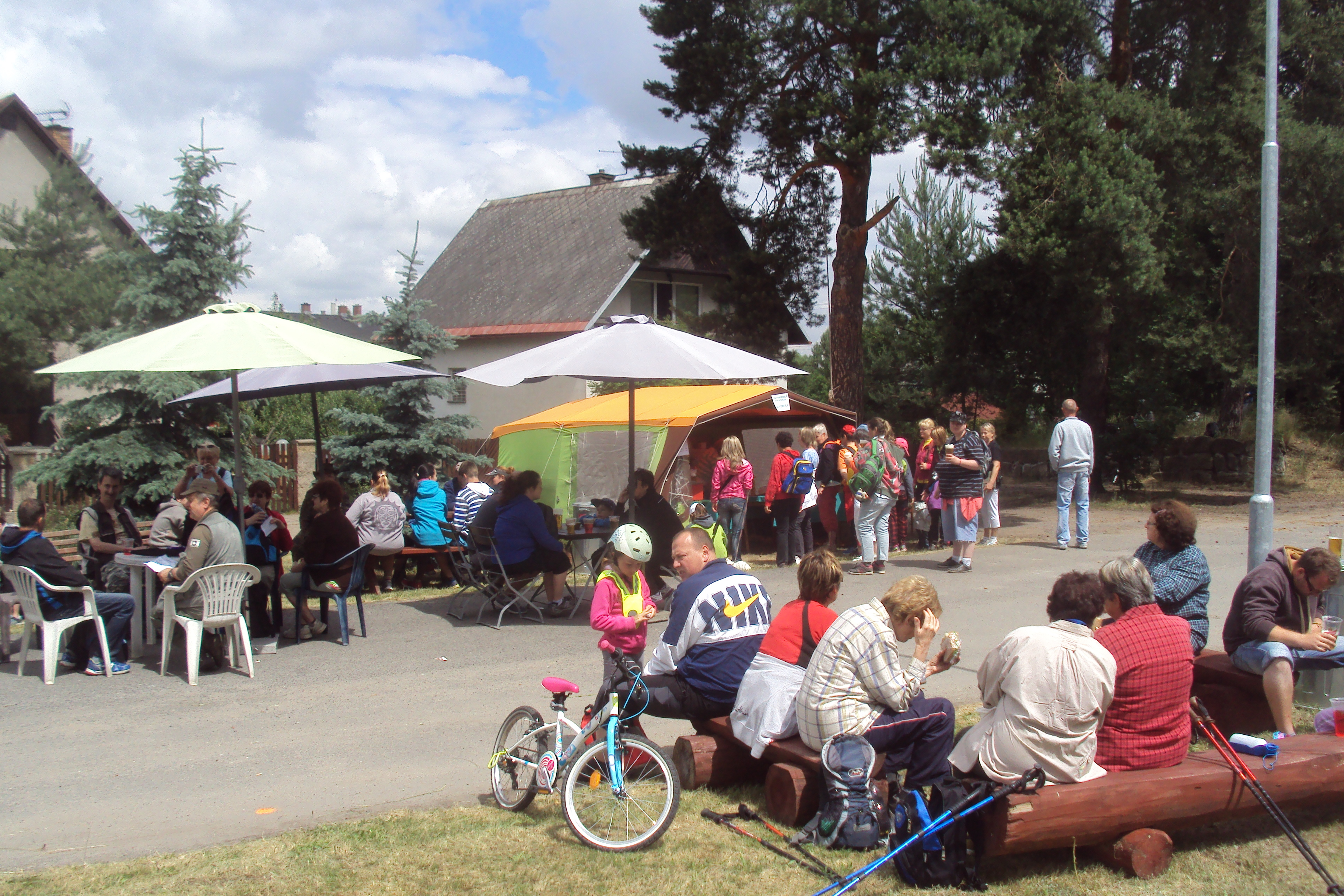 Kontrolní stanoviště pochodu v Srní